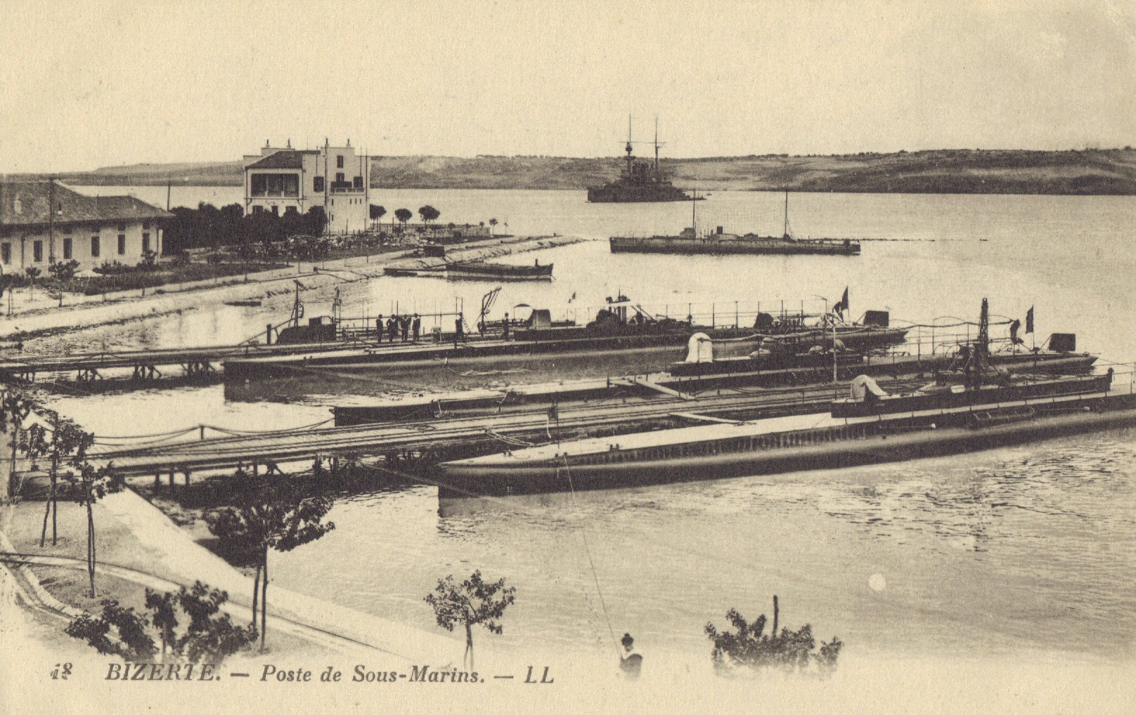 Bizerte vue sur le poste de sous-marins